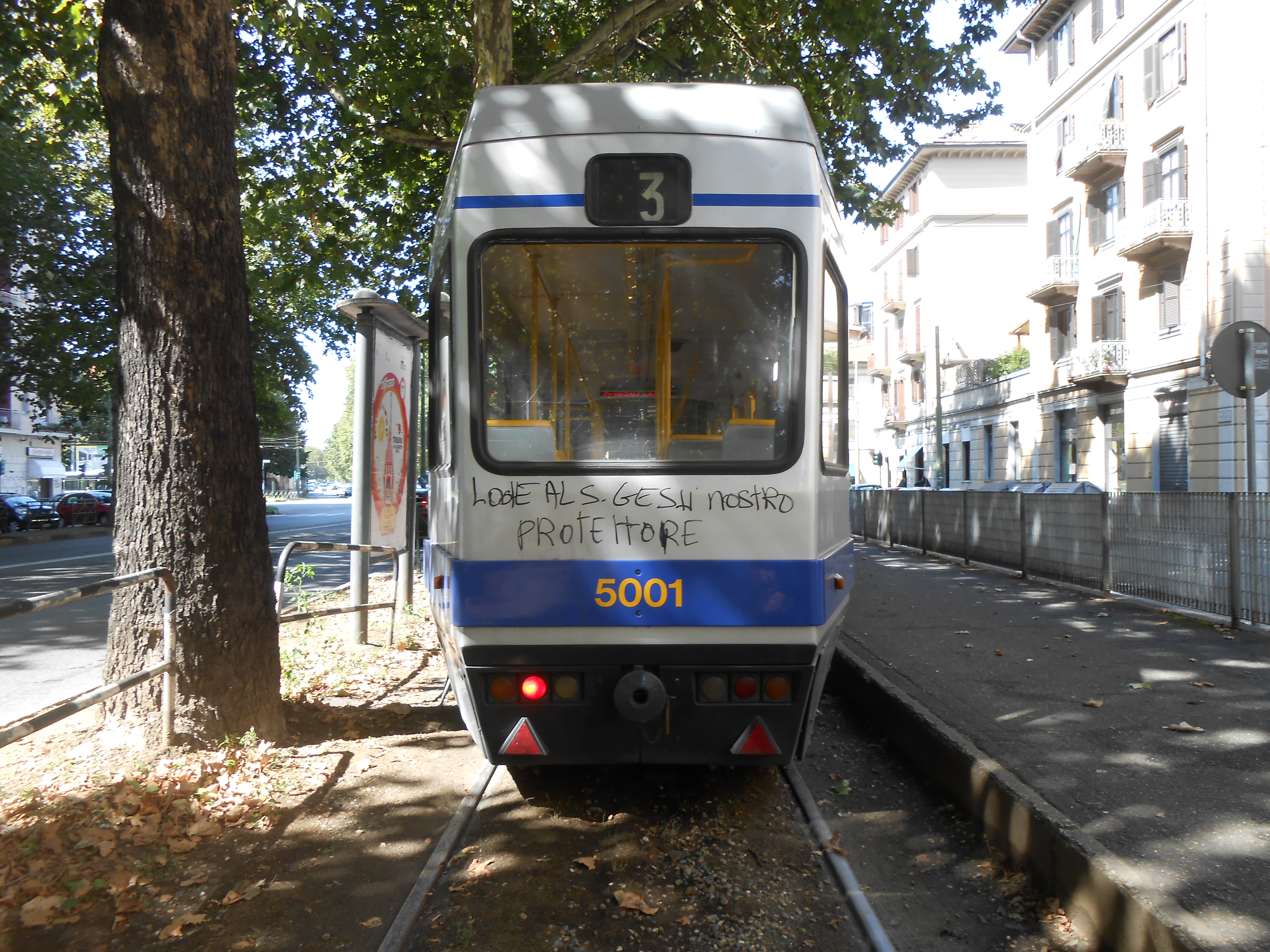 Tram 5001 del 1989 al capolinea del 3 in Corso Tortona.